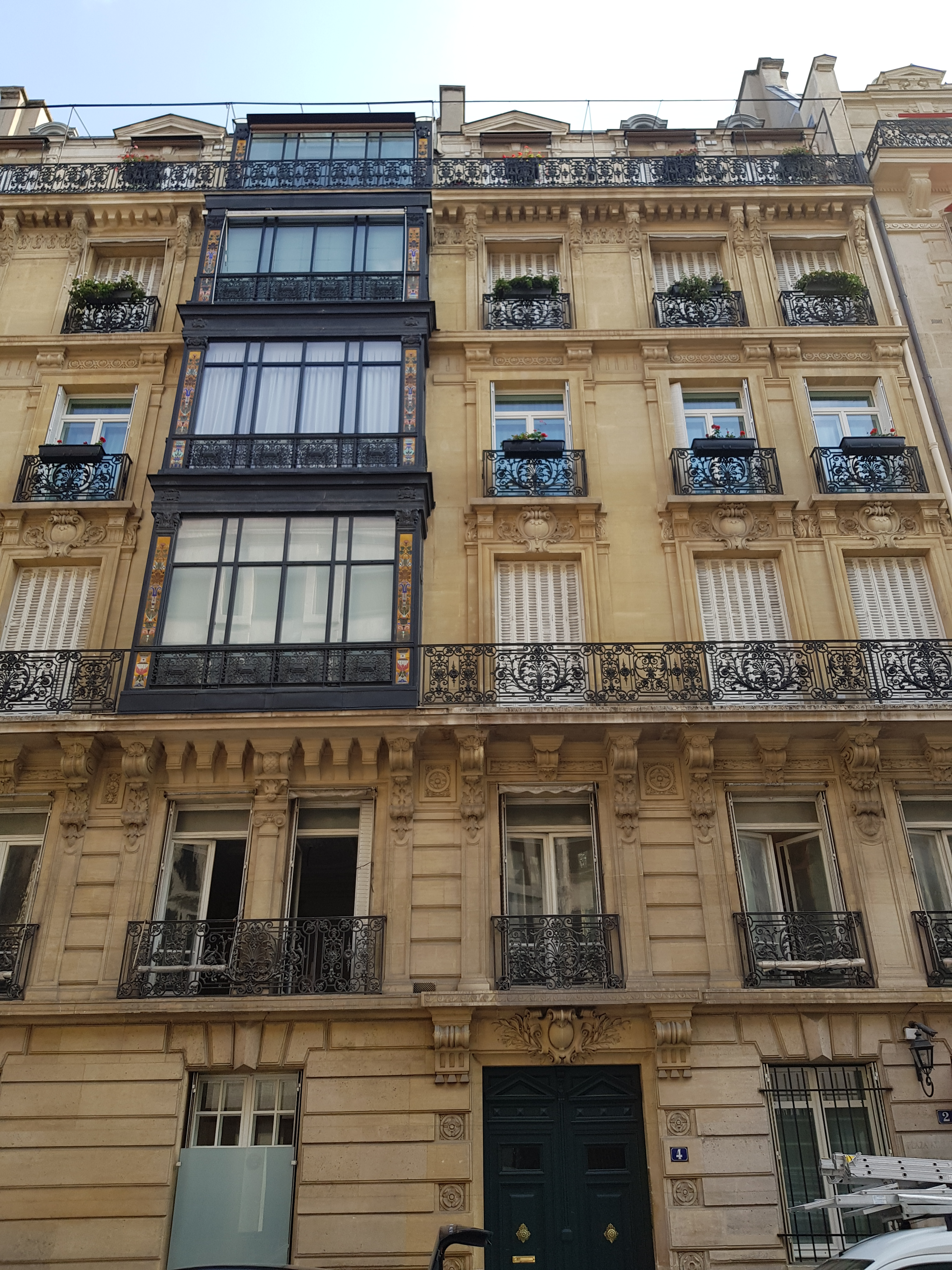 Façade du 4, rue du Boccador, Paris 8e.